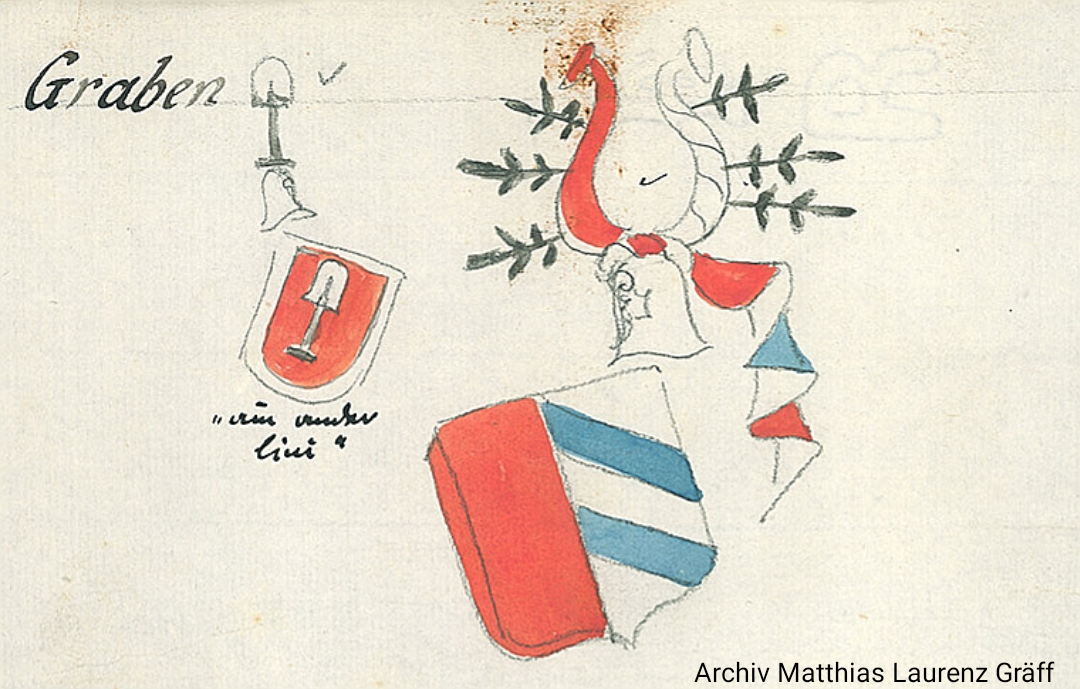 Beide Wappenvarianten der Herren von Graben (Archiv Matthias Laurenz Gräff; ursprünglich aus italienischem Archiv)